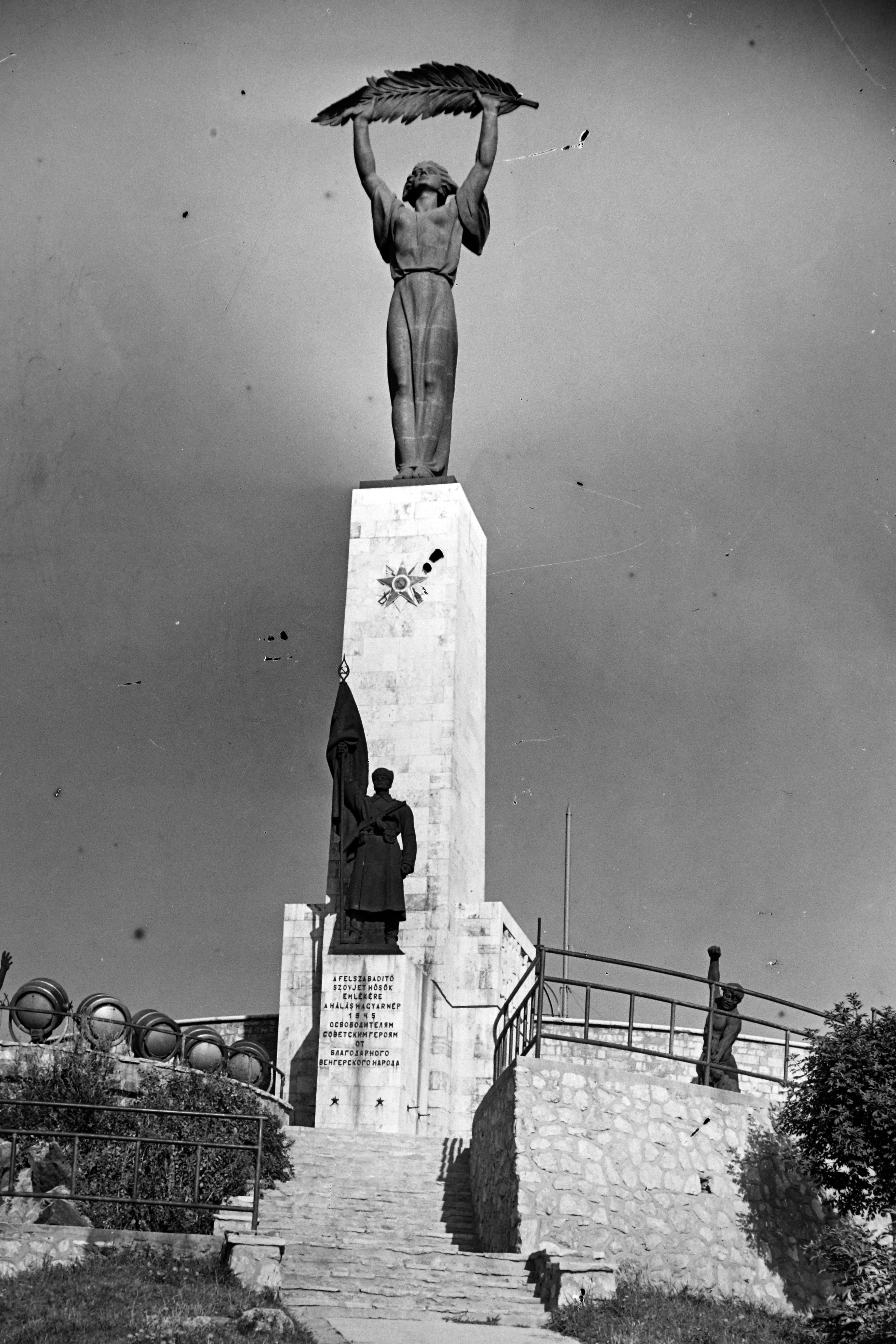 Felszabadulási Emlékmű (Kisfaludi Stróbl Zsigmond). Location: Hungary, Budapest XI. Tags: Budapest, monument, symbol, label, flight of stairs Title: Felszabadulási Emlékmű (Kisfaludi Stróbl Zsigmond).